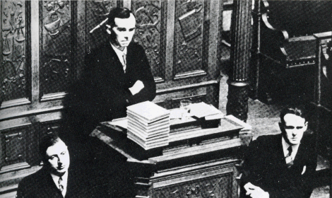 Gerard Wijdeveld (1905-1997) tijdens zijn promotie in 1937, gesecondeerd door Anton van Duinkerken (links) en Joan Kat (rechts).